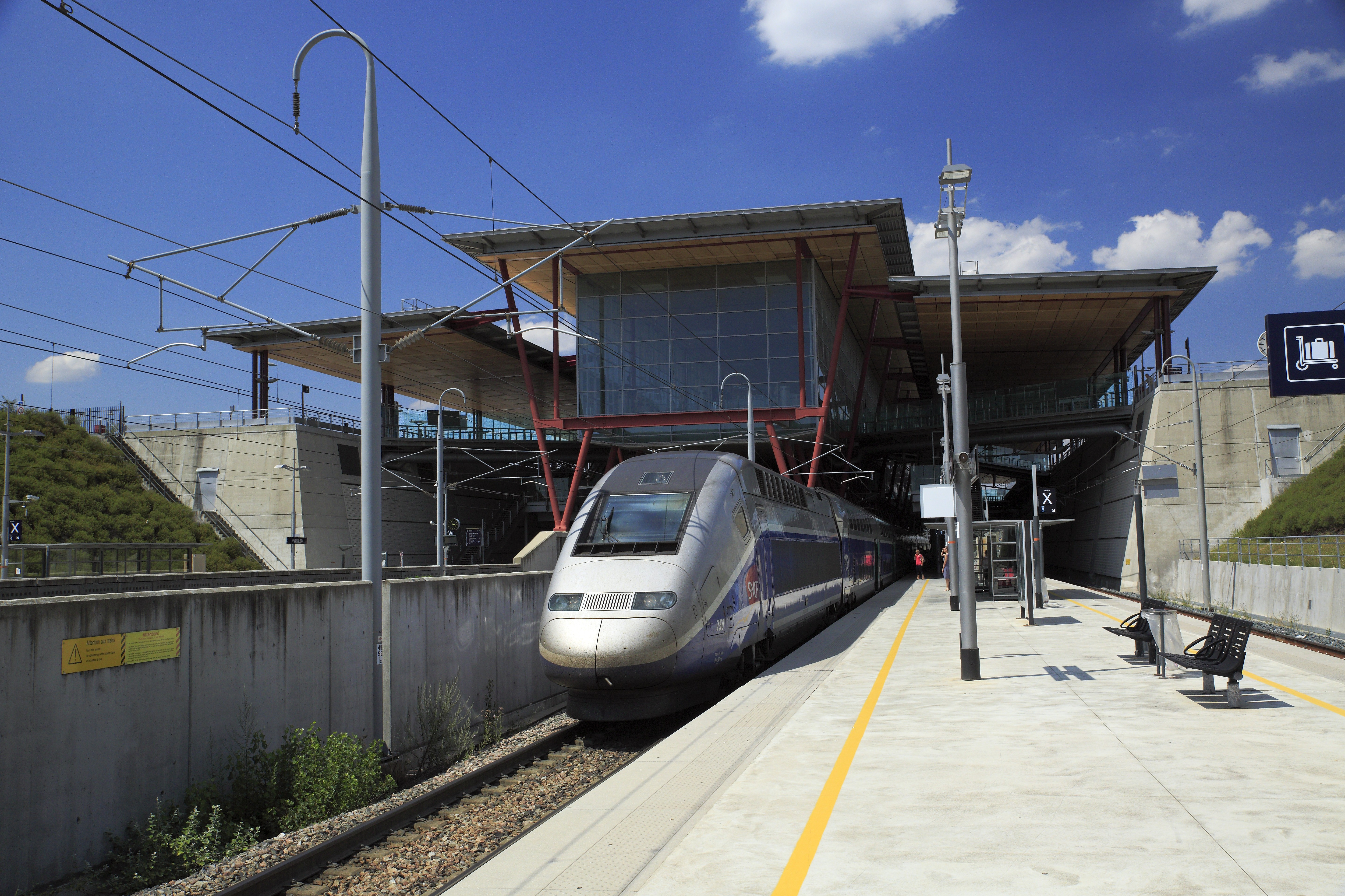 Bahnsteig Richtung Süden, die Schnellfahrstrecke liegt hier im Einschnitt. In de Mitte liegen die bahnsteiglosen Durchfahrgleise, das Bahnsteiggleis ganz rechts war beim Bau der Anlage nur vorbereitet worden, der Gleistrog war provisorisch verfüllt. Es ist erst nach 2010 eingebaut worden und Richtung Norden nur an die Strecke von (und nach) Grenoble angebunden.